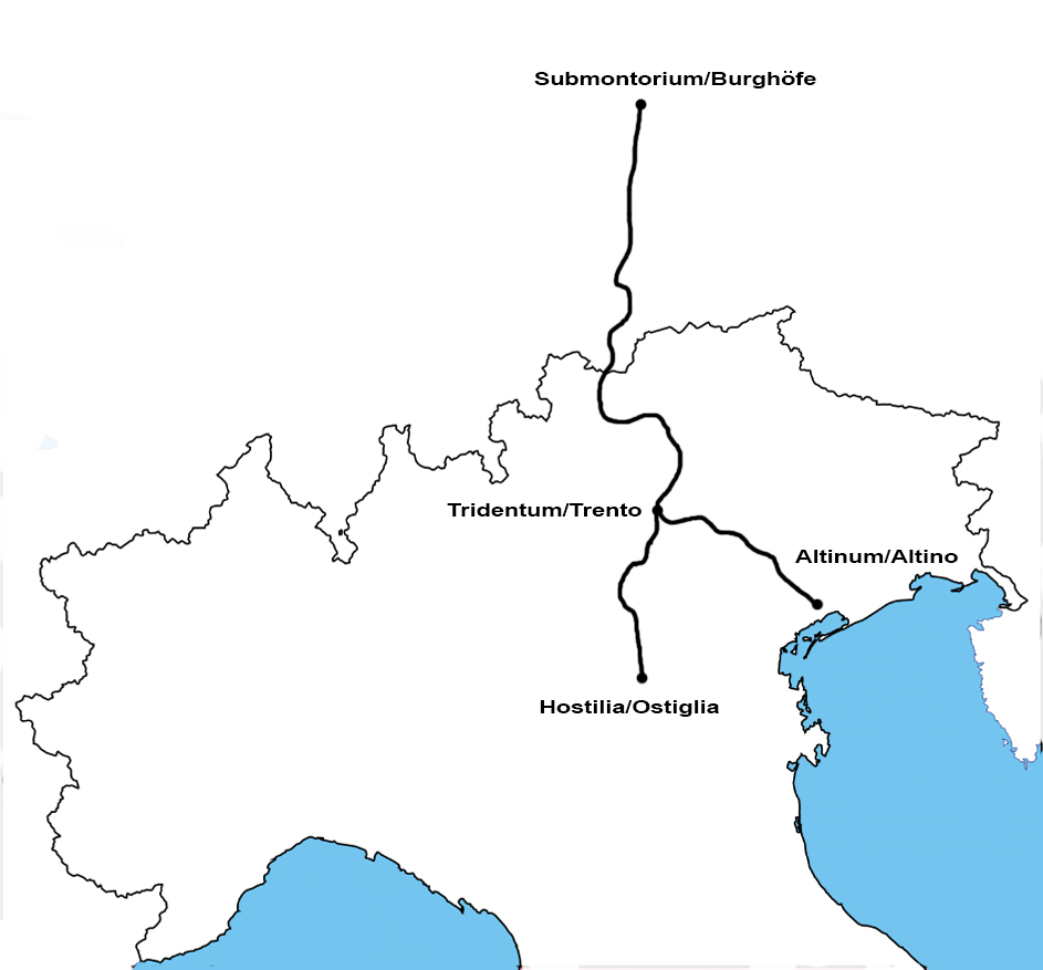 L'immagine rappresenta l'ipotesi più accreditata del percorso della via Claudia Augusta